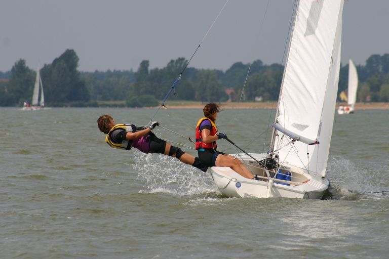 Bootsklasse Korsar auf dem Altmühlsee